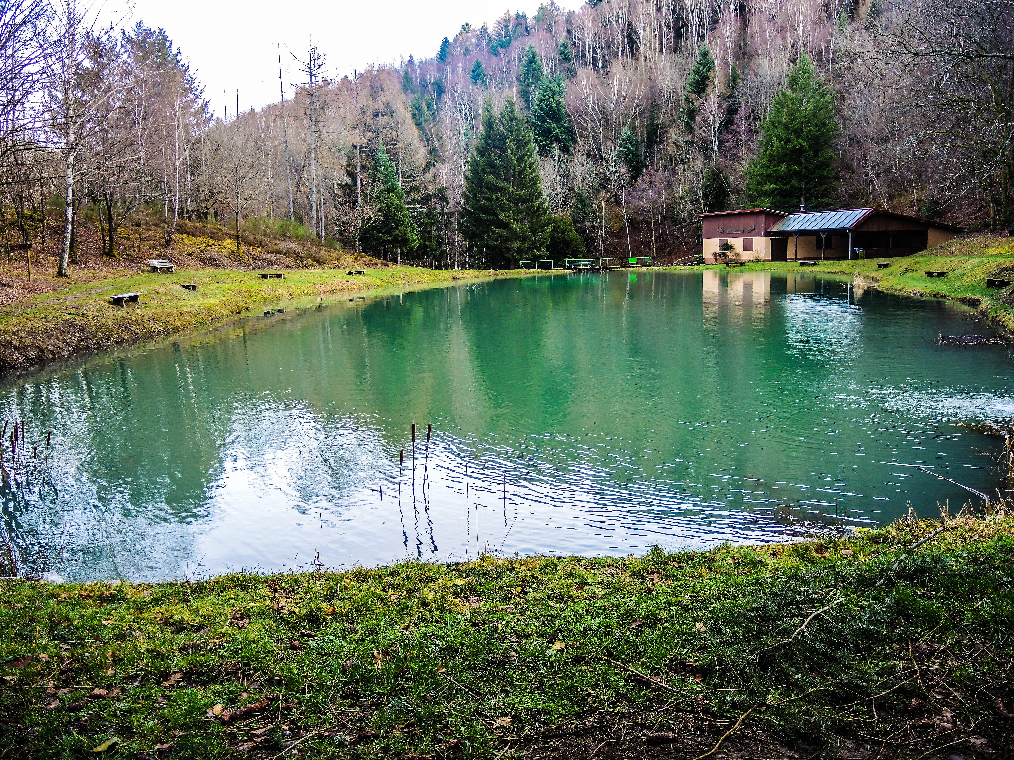 Etang du Firmenweiher. Saint-Amarin. Haut-Rhin